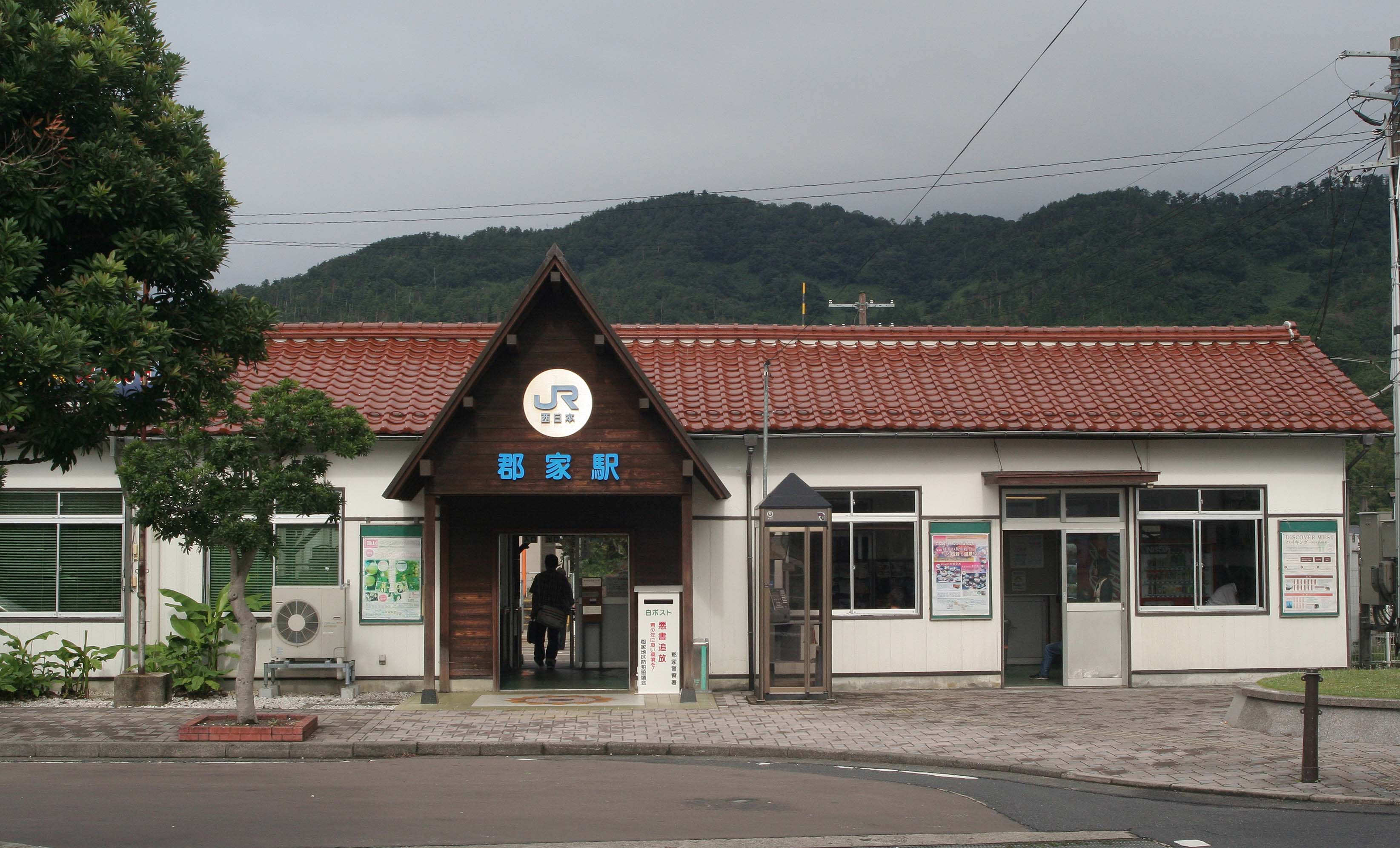 郡家駅の駅舎